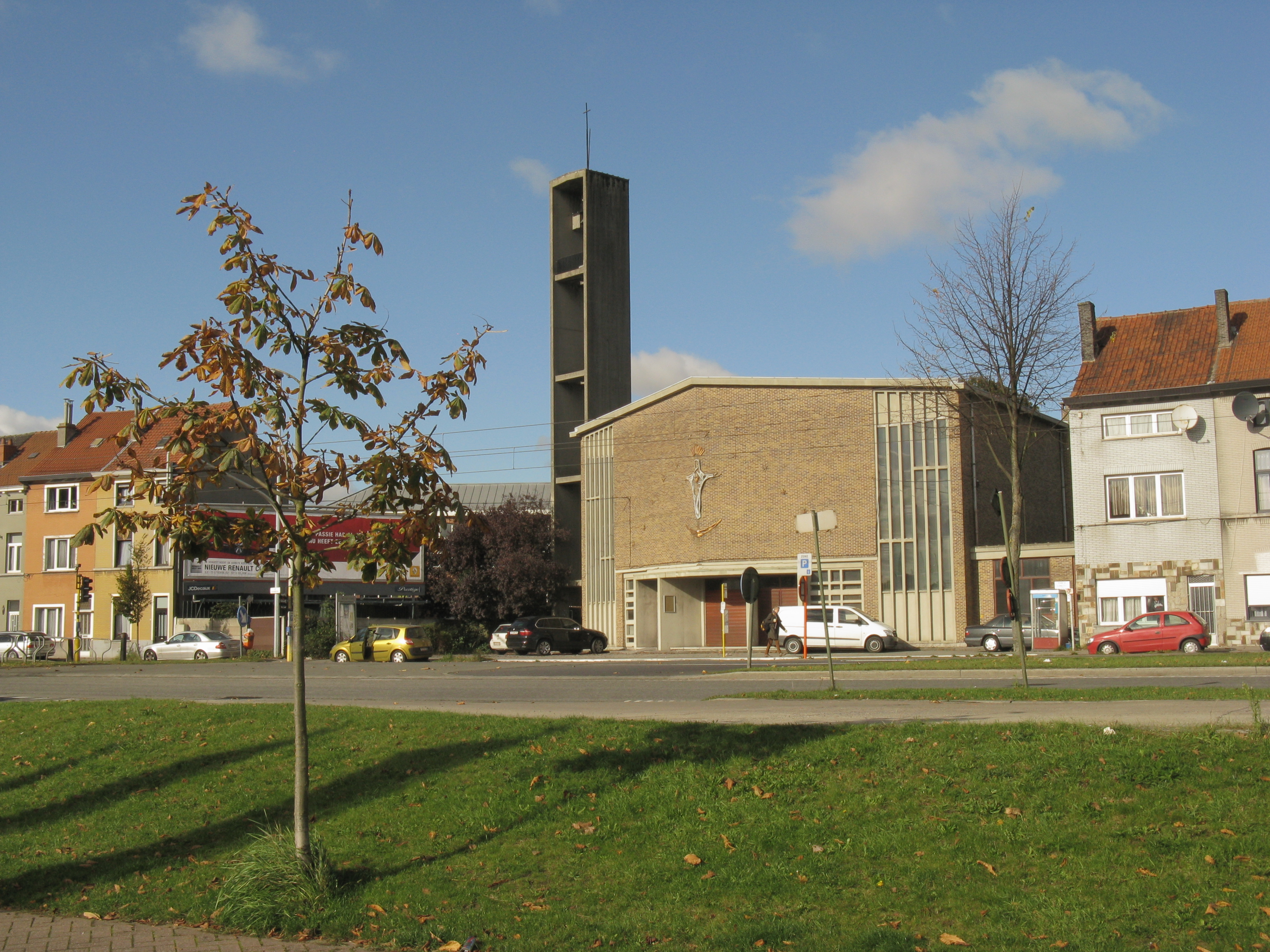 Blaisantvest, Ghent, Belgium